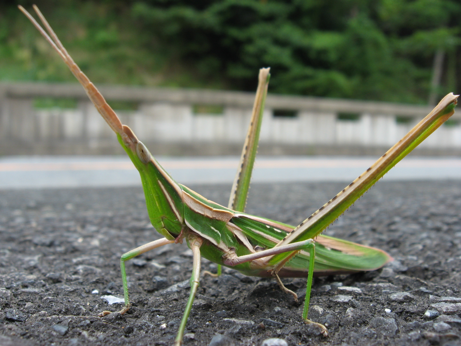 ショウリョウバッタ Acrida cinerea